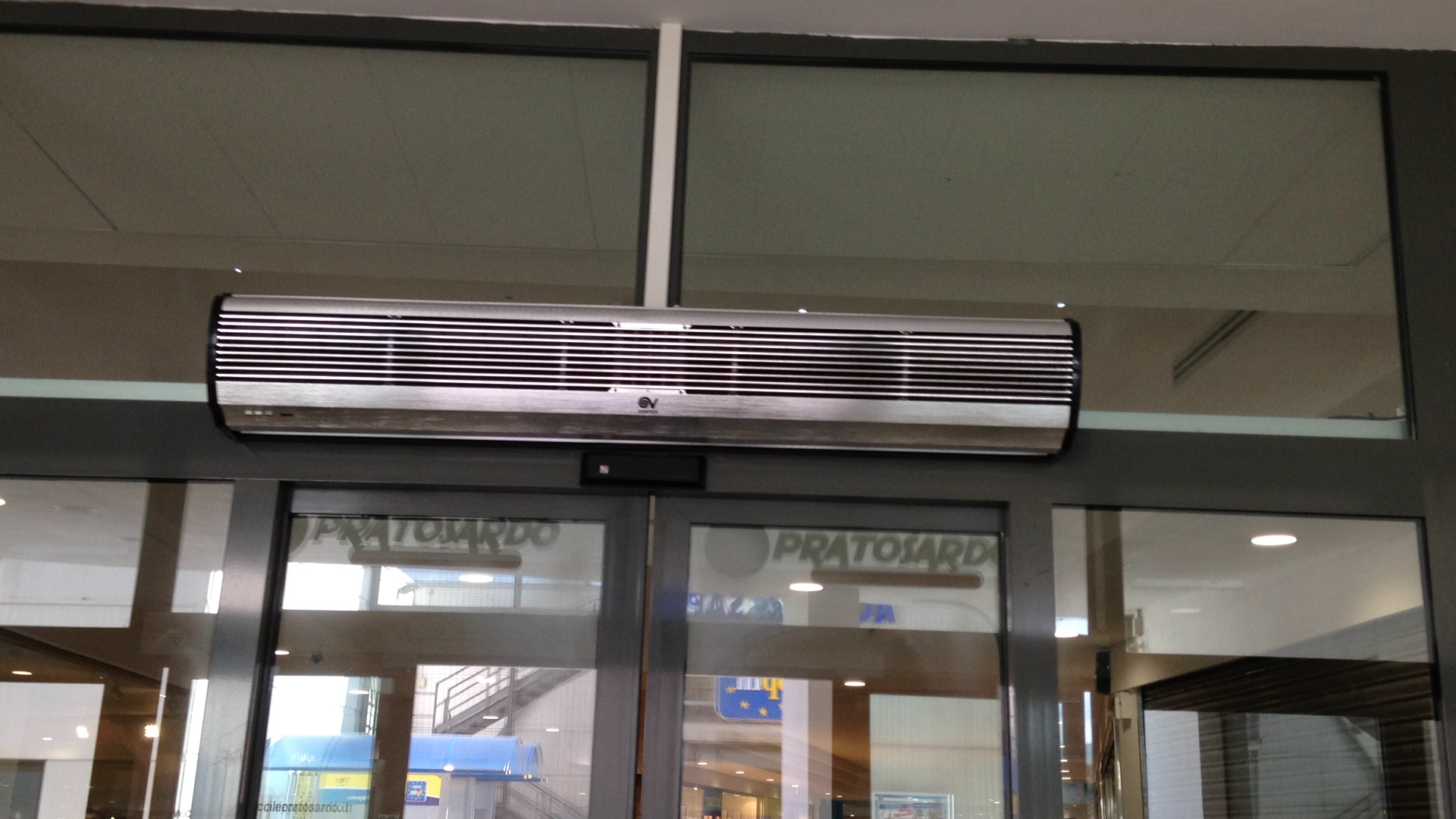 Barriera d'aria Vortice all'ingresso di un centro commerciale.